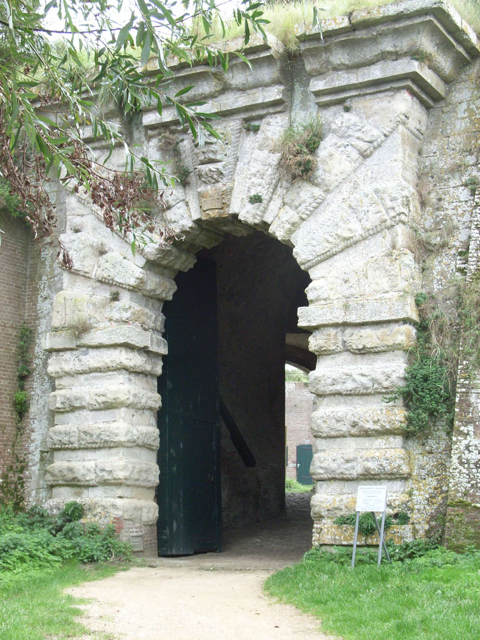 Fort rammekens, Entrance